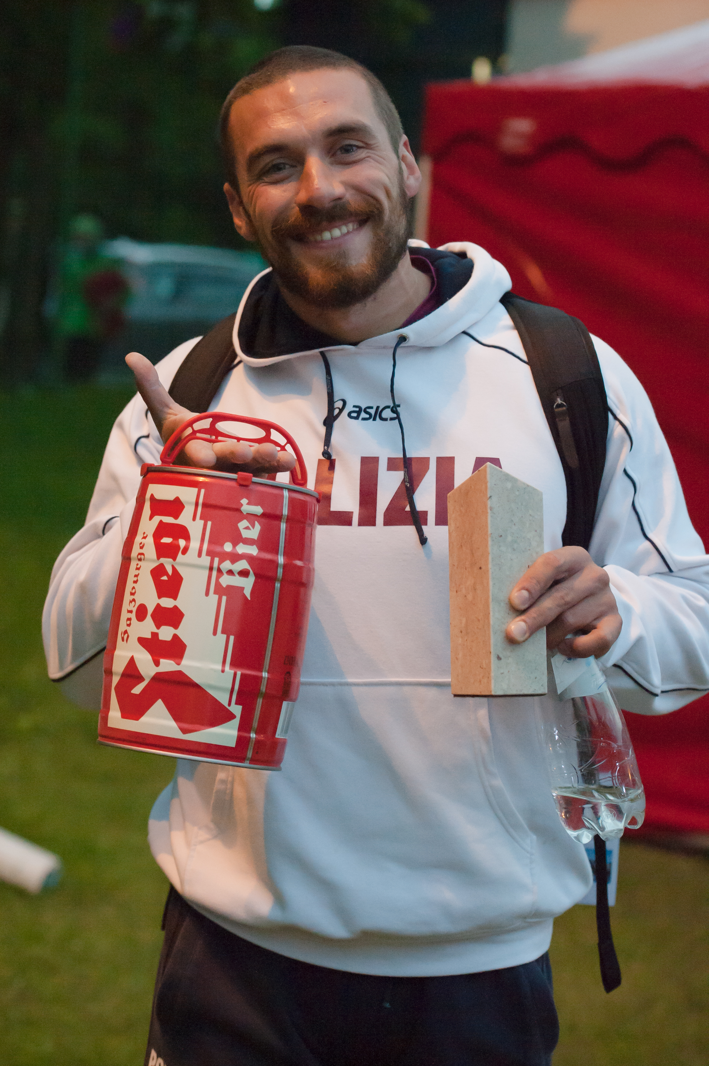 Salzburger Leichtathletik Gala am 27. Mai 2015: Roberto Bertolini